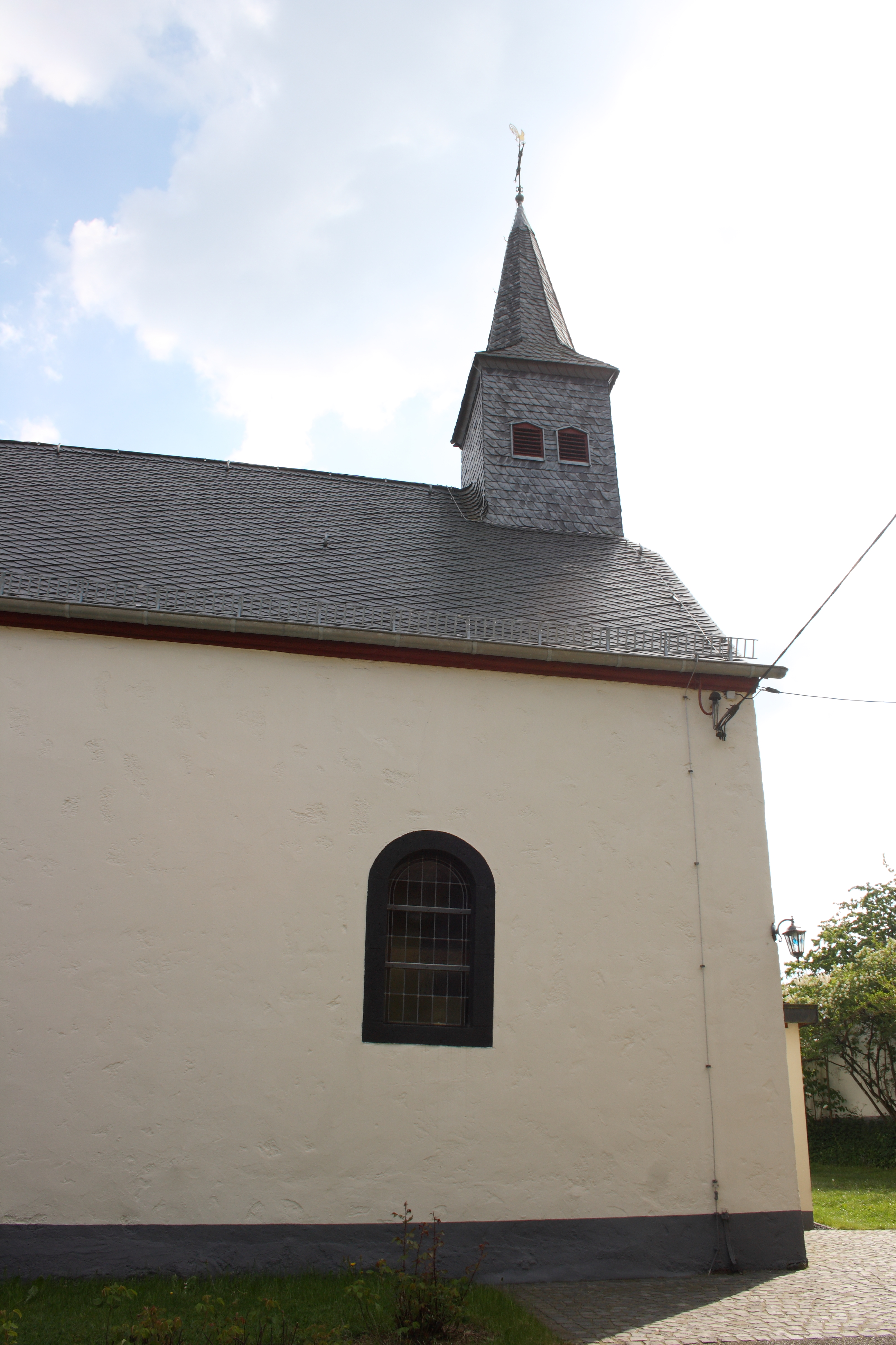 Katholische Kapelle St. Sebastian in Mannebach